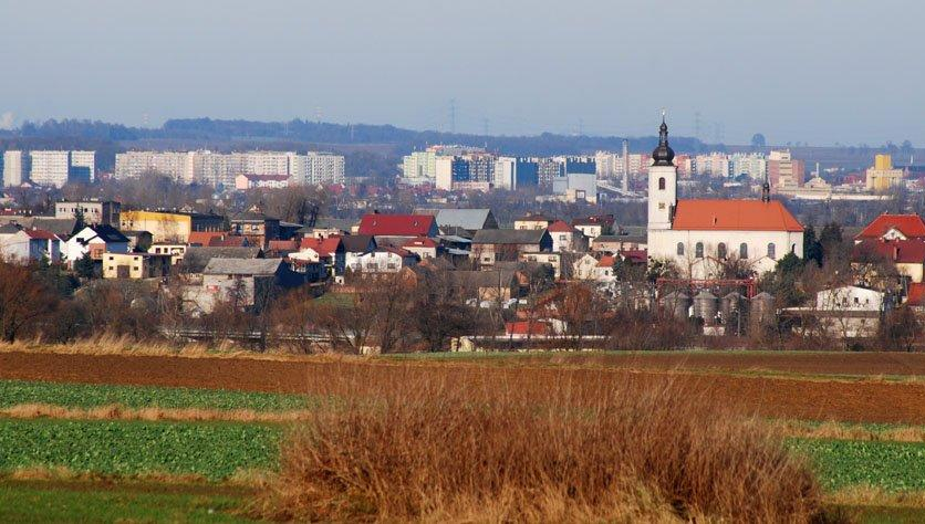 Widok z Urbanka na Bieńkowice. Widoczne w oddali, (jakieś 10 km), blokowiska to już Racibórz. Po prawej stronie kadru widoczny kościół św. Mikołaja na Starej Wsi.